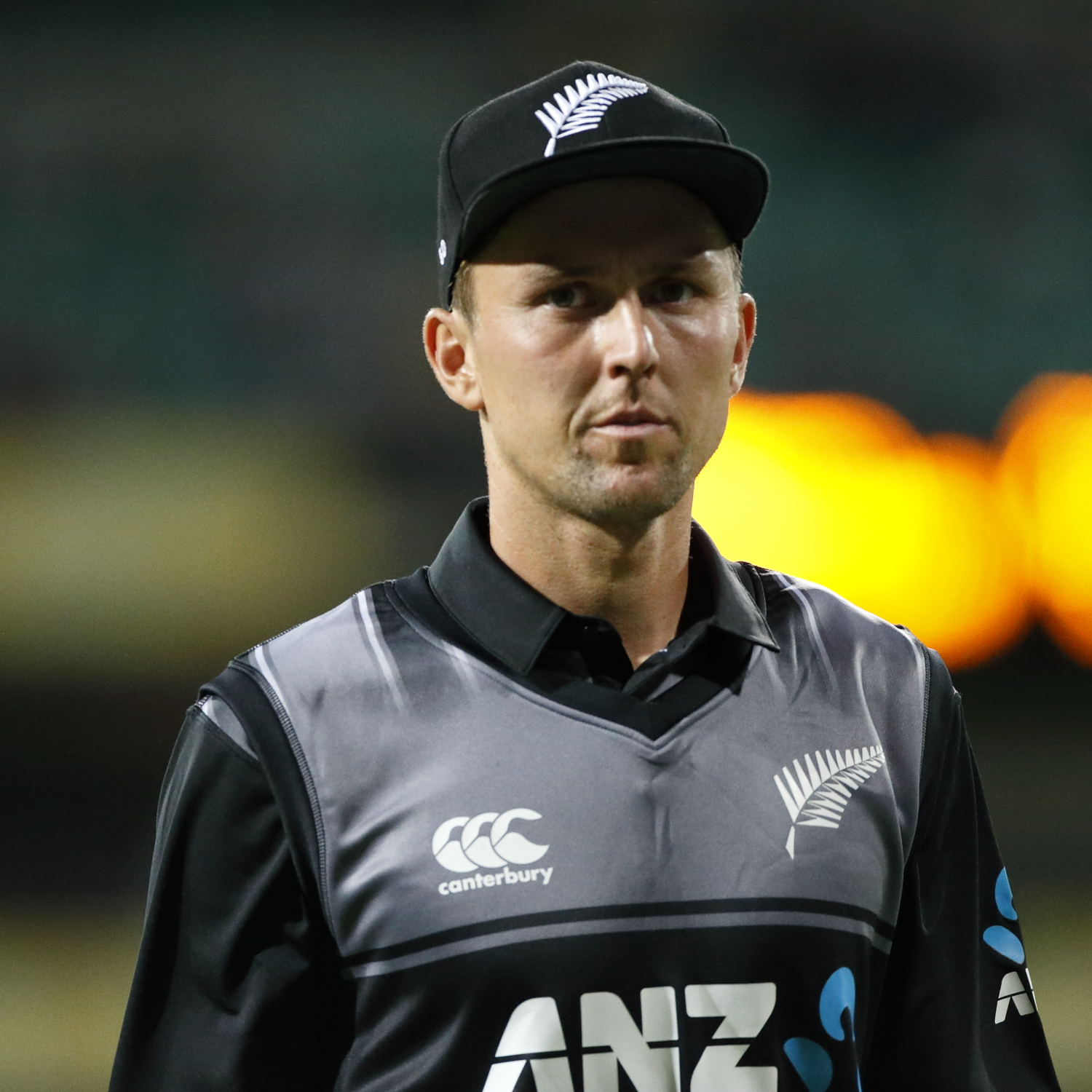 Trent Boult